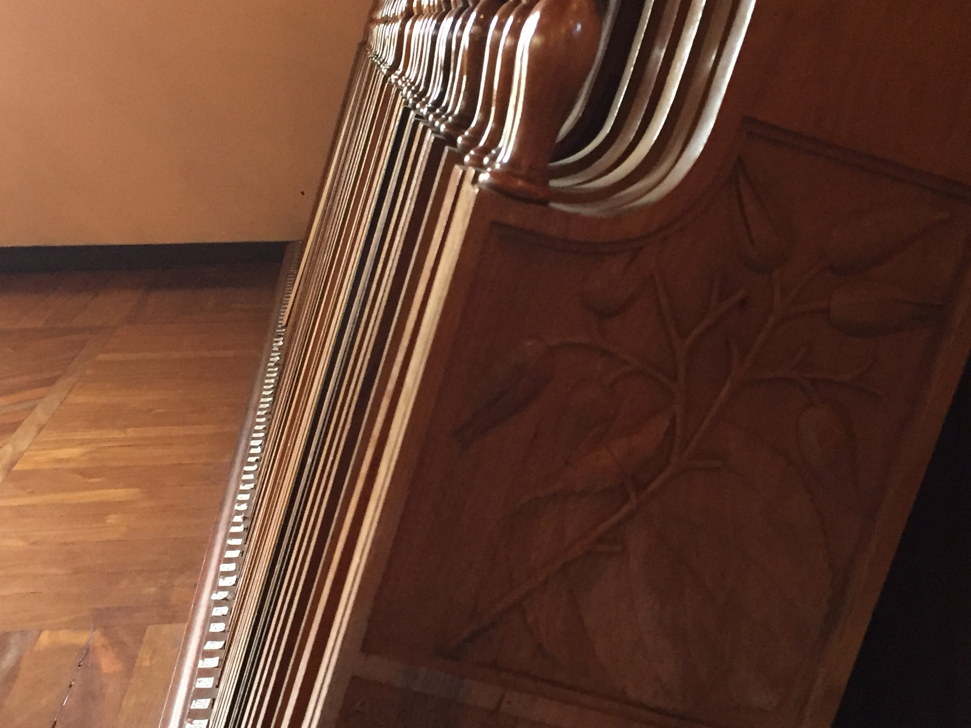 Mostruário da tábuas feitas em diferentes tipo de madeiras com suas respectivas ilustrações científicas